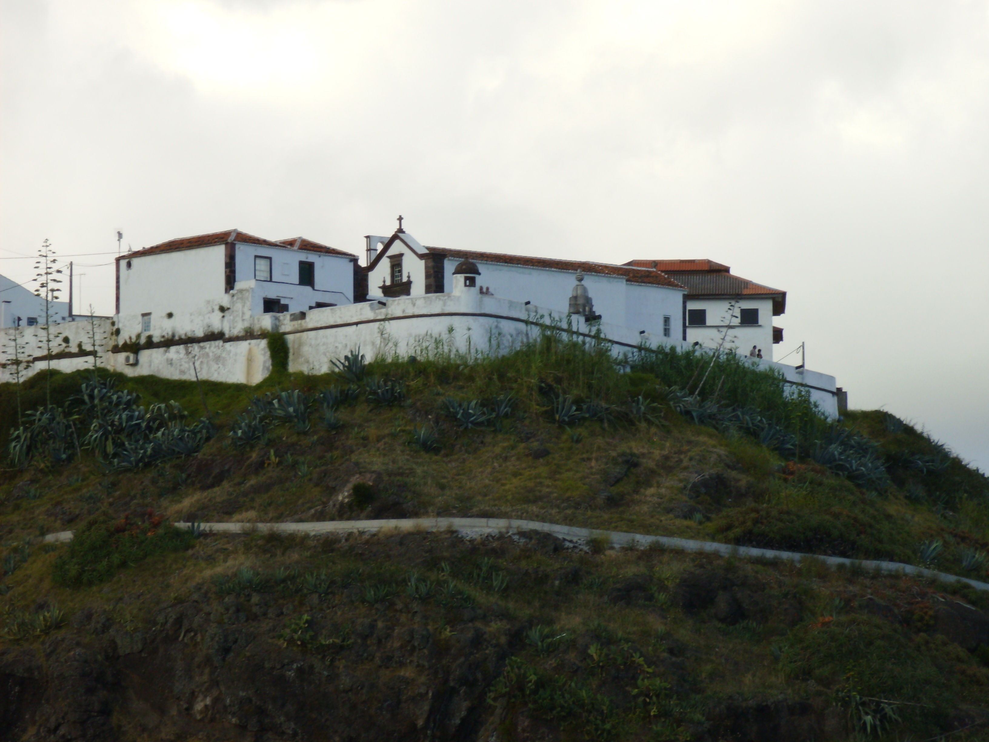 Forte de São Brás, freguesia e concelho de Vila do Porto, ilha de Santa Maria, Açores.